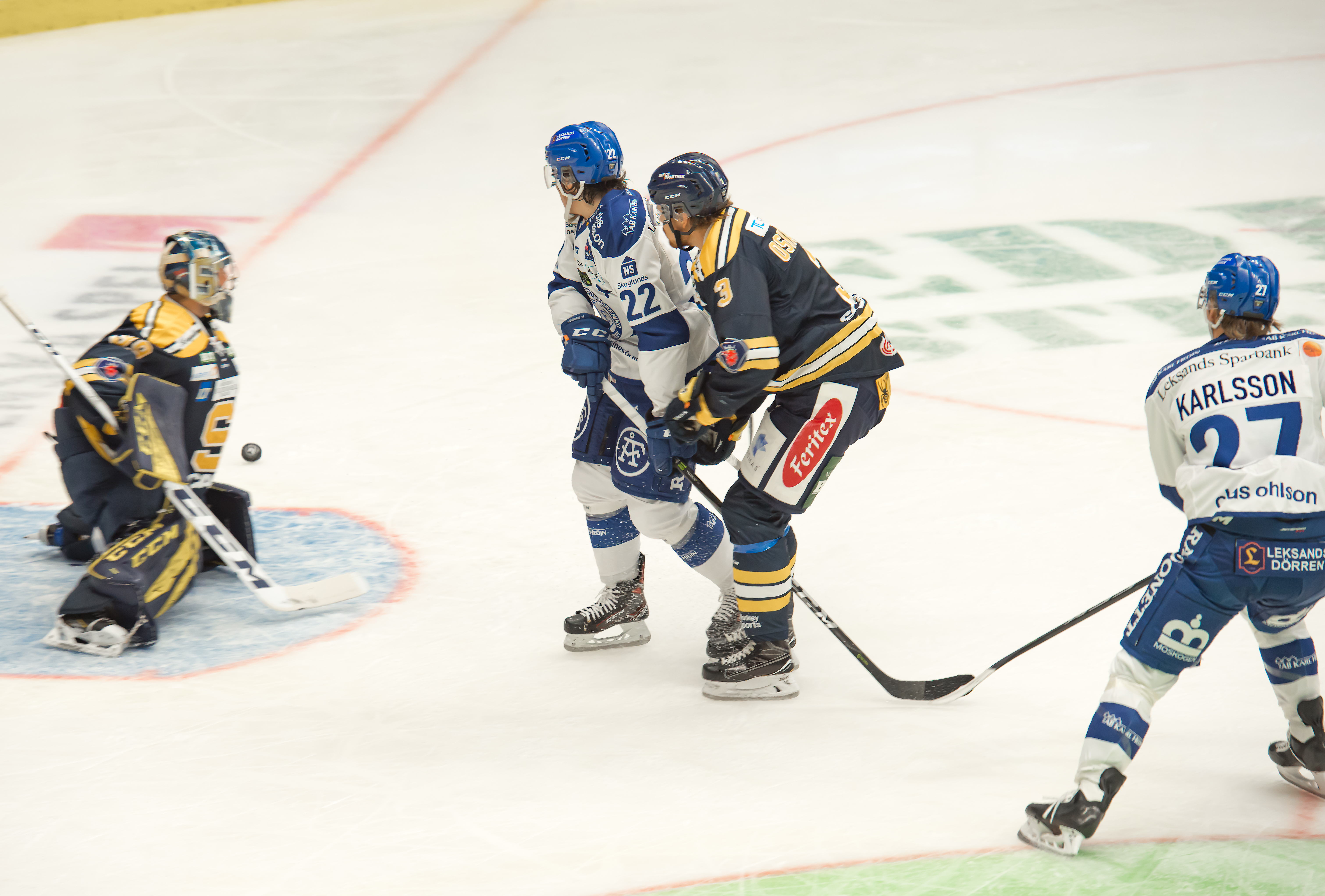 Hockeyallsvenskan Södertälje vs Leksand 2018-10-05 resultat 3-6